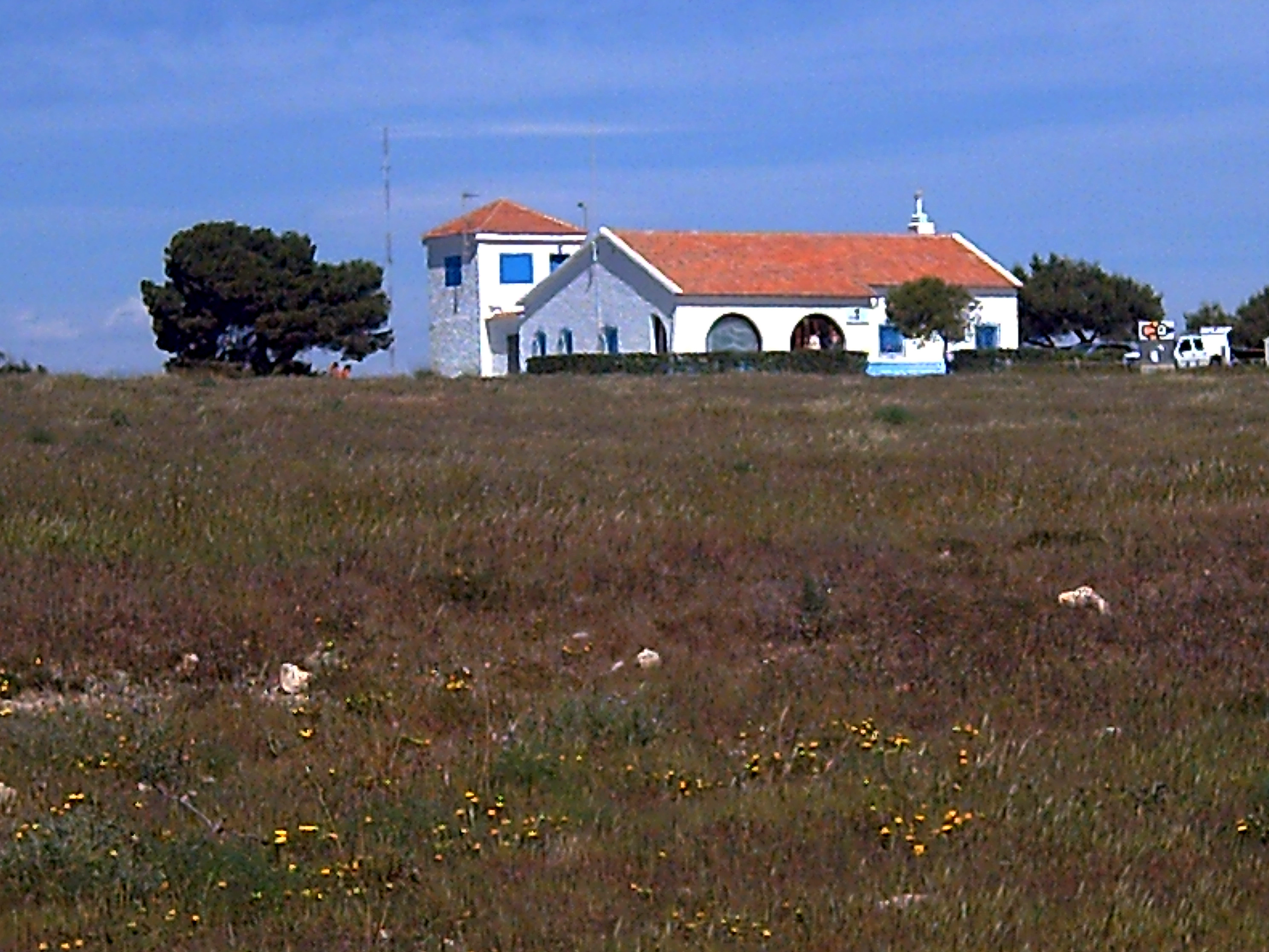 Visitors Centre, Parque Natural de las Lagunas de La Mata y Torrevieja, Torrevieja, Alicante, Spain